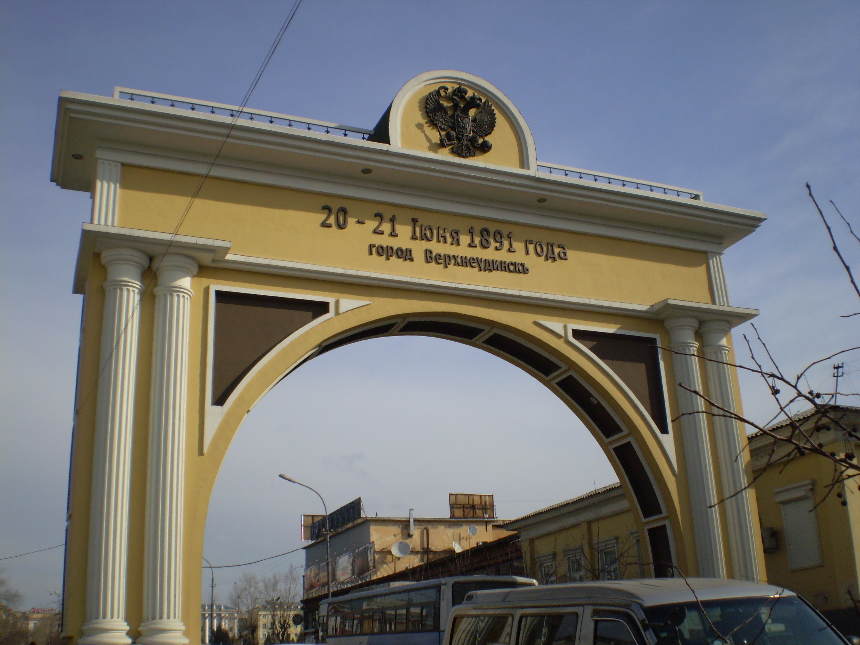 Арка на улице Ленина в Улан-Удэ.